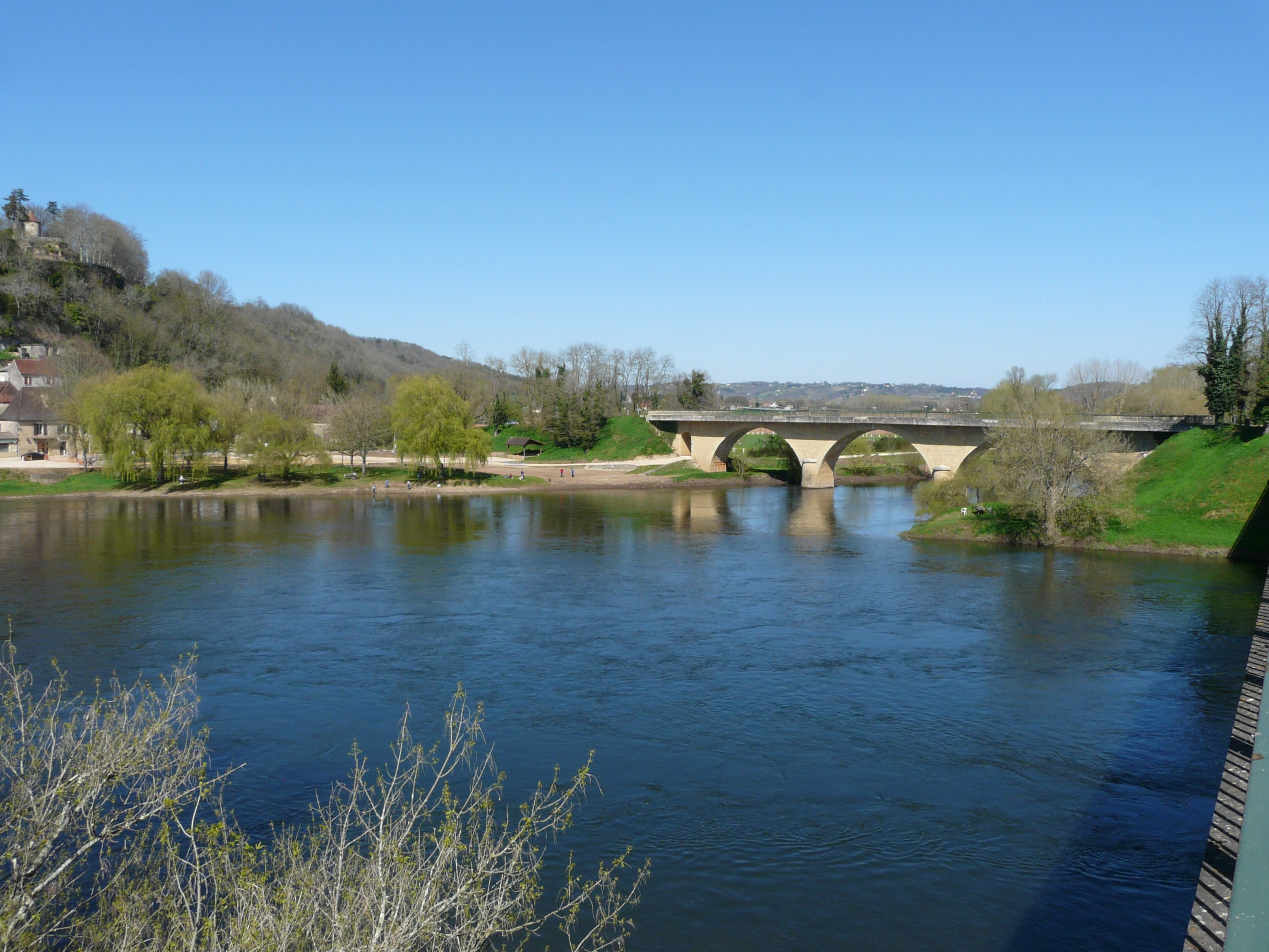 La Dordogne à Limeuil, Dordogne, France. Au fond, la Vézère passe sous le pont avant de confluer avec la Dordogne. Vue prise depuis la commune d'Alles-sur-Dordogne.